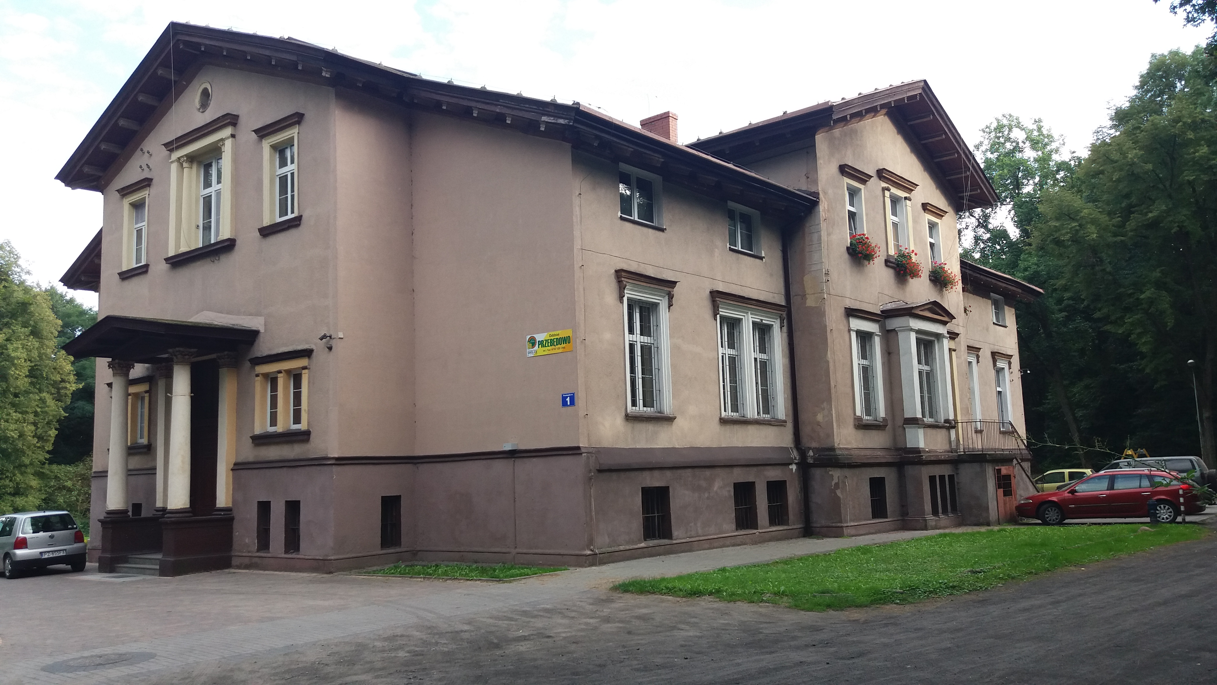 Pałac w Przebędowie (wielkopolskie) 2016 r.